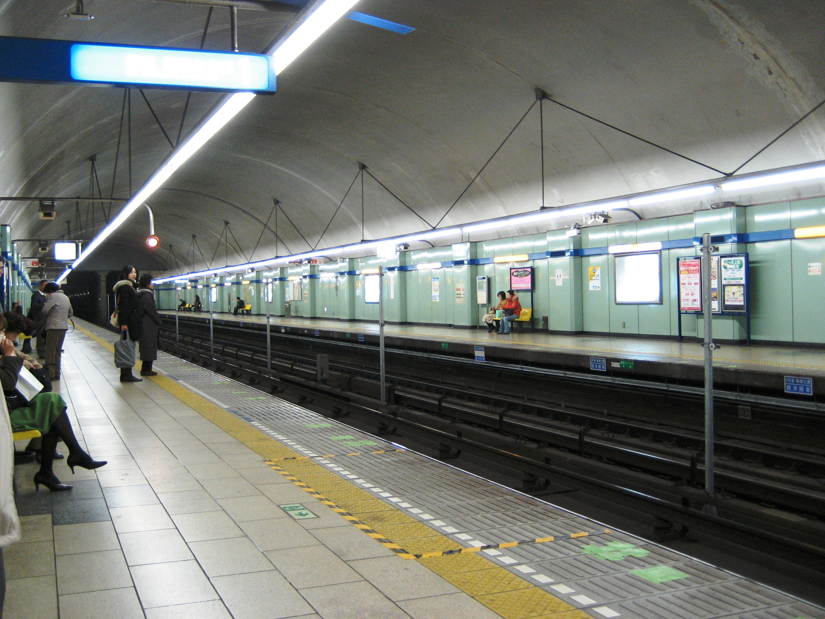 Yokohama municipal subway,Mitsuzawa-kamicho station.